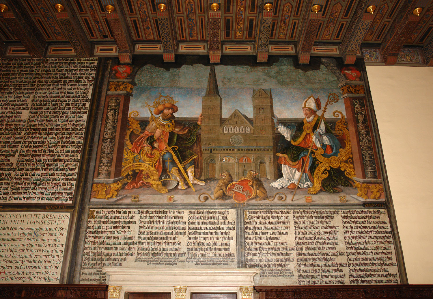 Rathaus in Bremen. Fresco des niederrheinischen Meisters Bartholomäus Bruyn von 1532 in der Oberen Halle. Es zeigt die Gründung des Bistums Bremen durch Kaiser Karl den Großen, der Bischof Willehad das Bistum überträgt; ein Modell des Bremer Dom – in seiner Form von 1532 – befindet sich zwischen den Beiden.